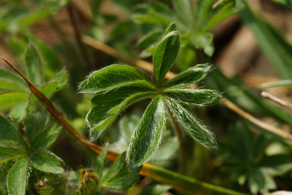 Sedmerolistni petoprstnik na vznožju Nanosa